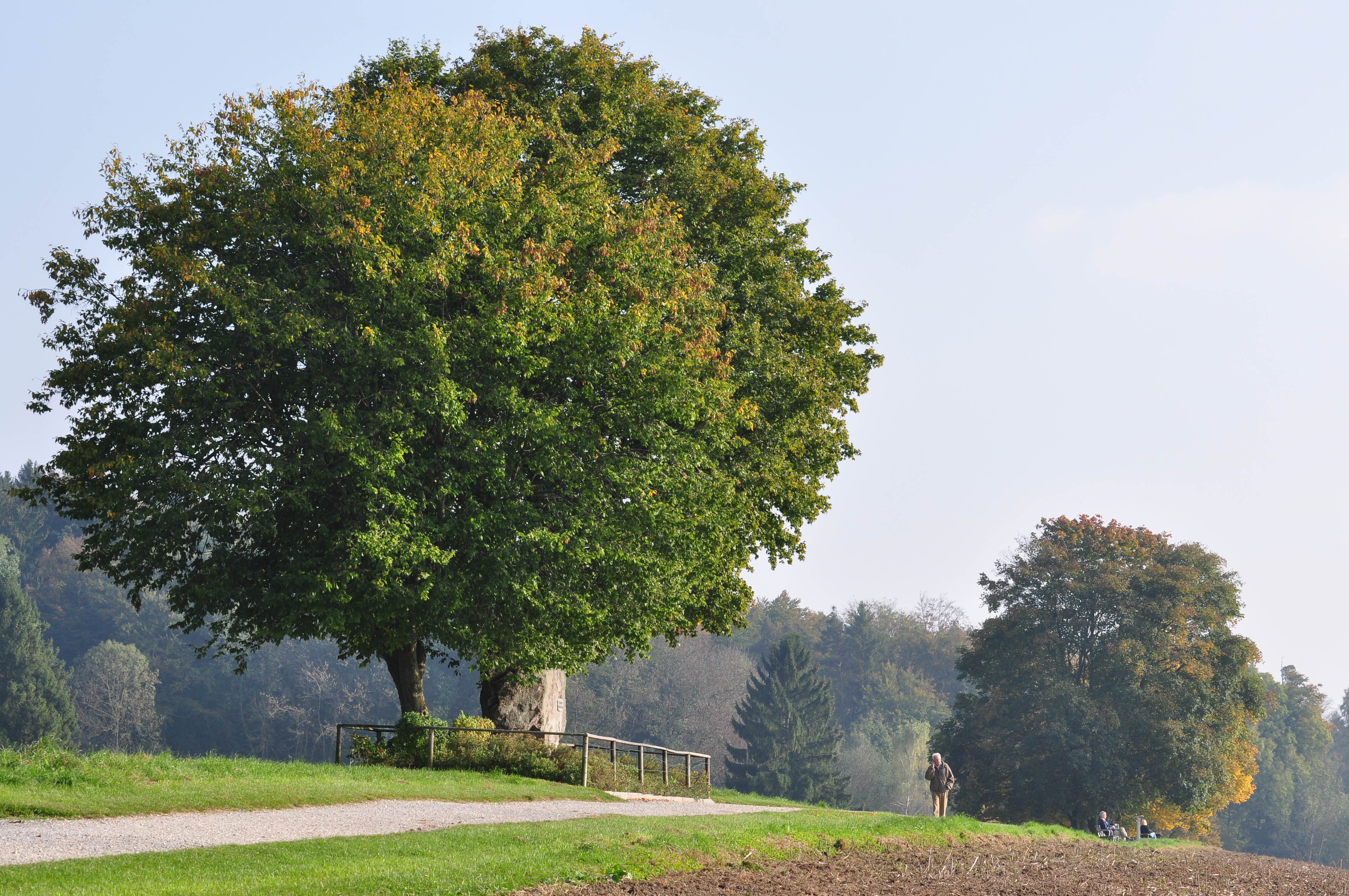 Henri Guisan Denkmal (memorial), Allmend in Zollikon (Switzerland)